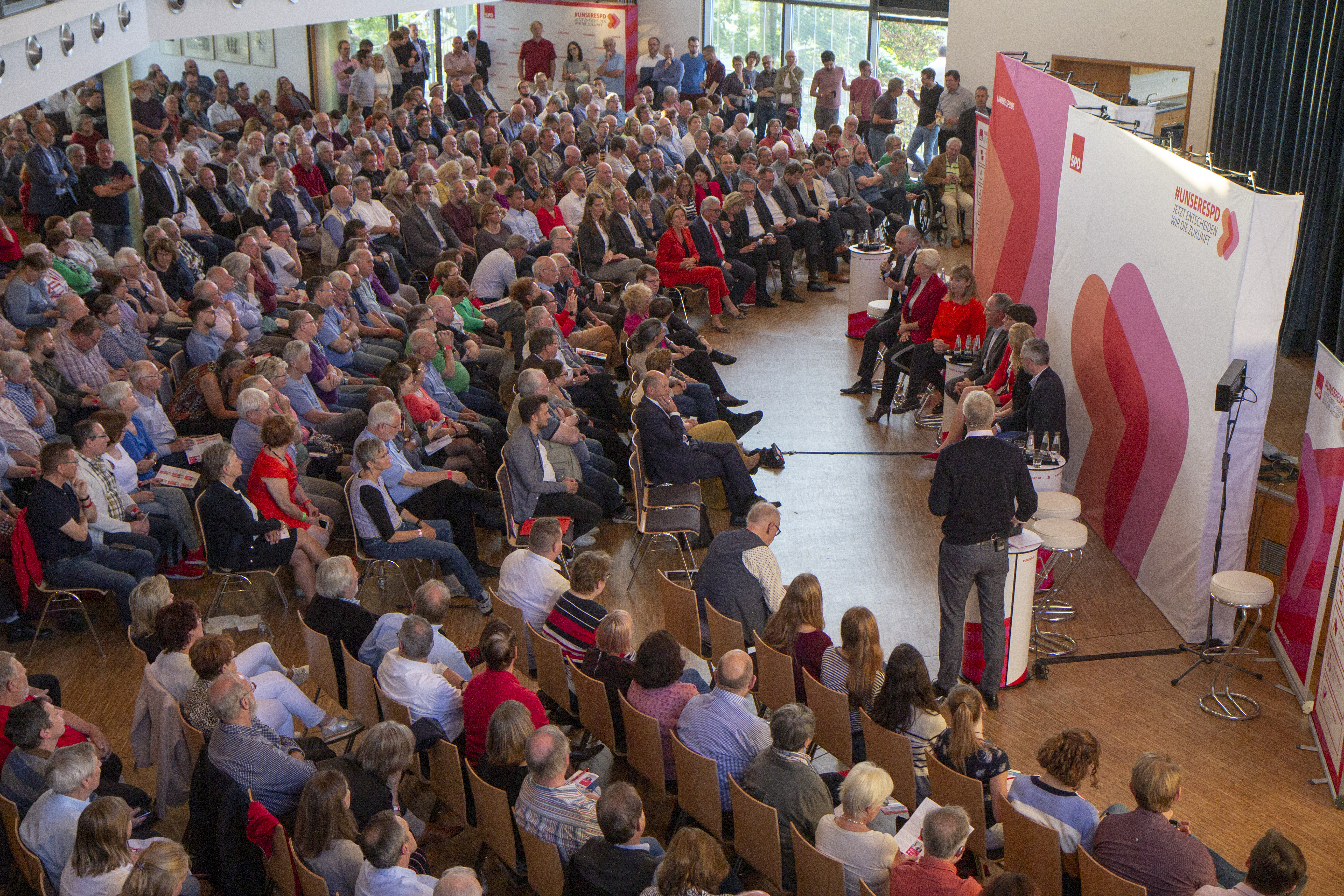 SPD Regionalkonferenz zur Wahl des SPD-Vorsitzes am 10. September 2019 in Nieder-Olm.